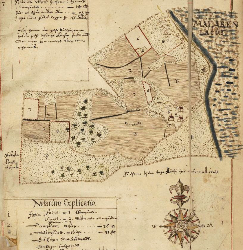 Fittja gårds ägor, Botkyrka socken, geometrisk avfattning